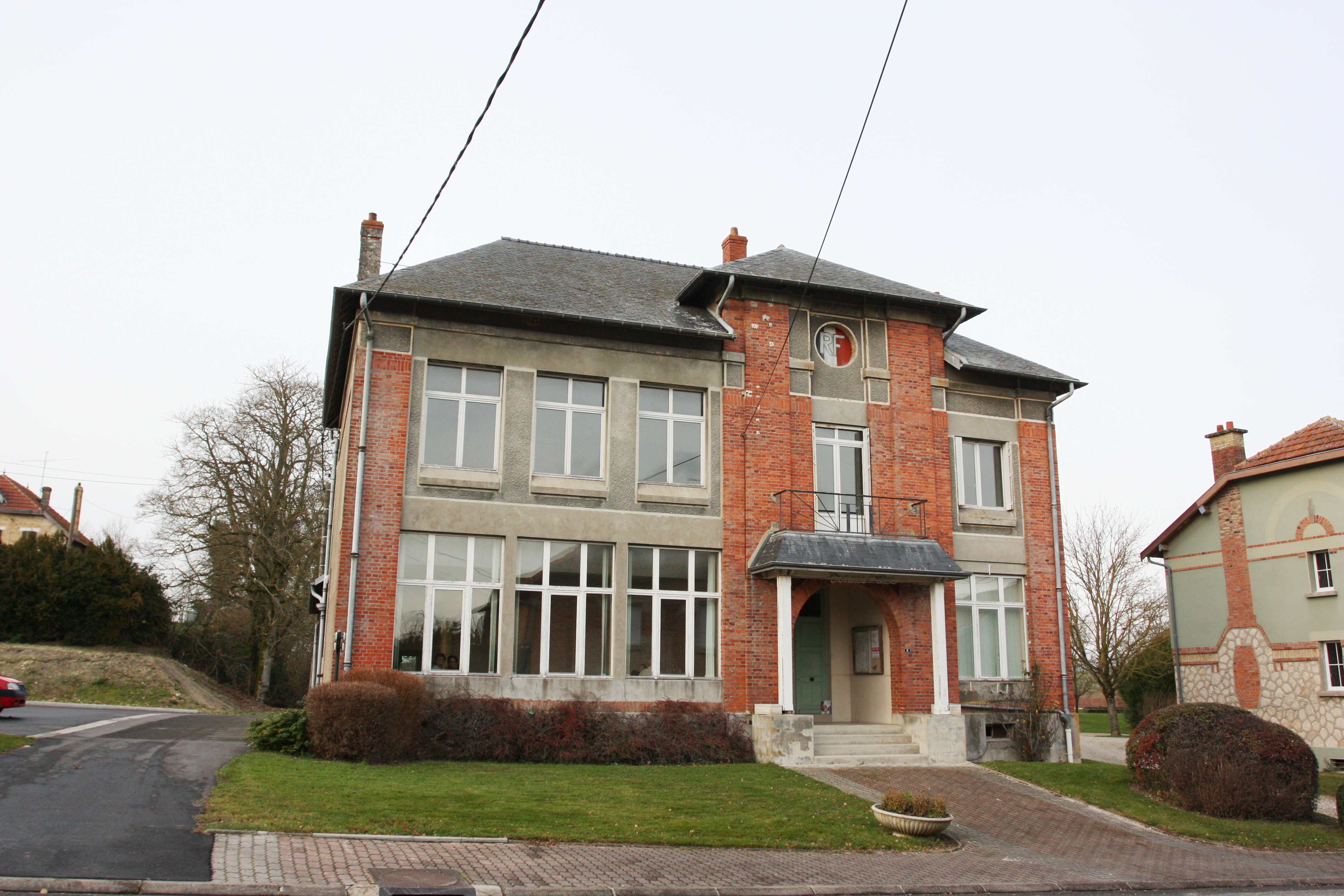 Village Ardennais